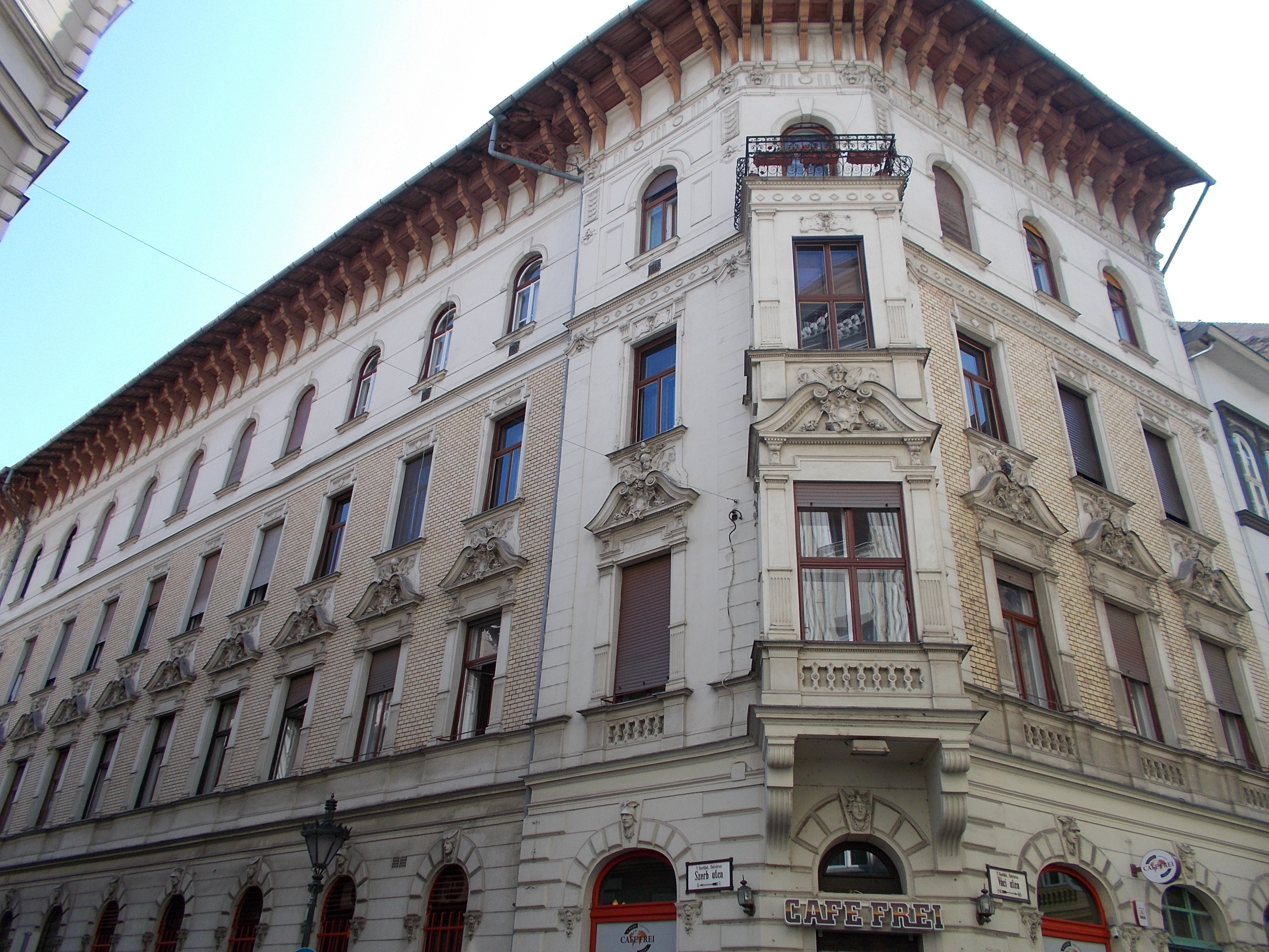 Sarokház kávézóval - Magyarország, Budapest, V. kerület, Váci utca 74 (Szerb utca sarok)